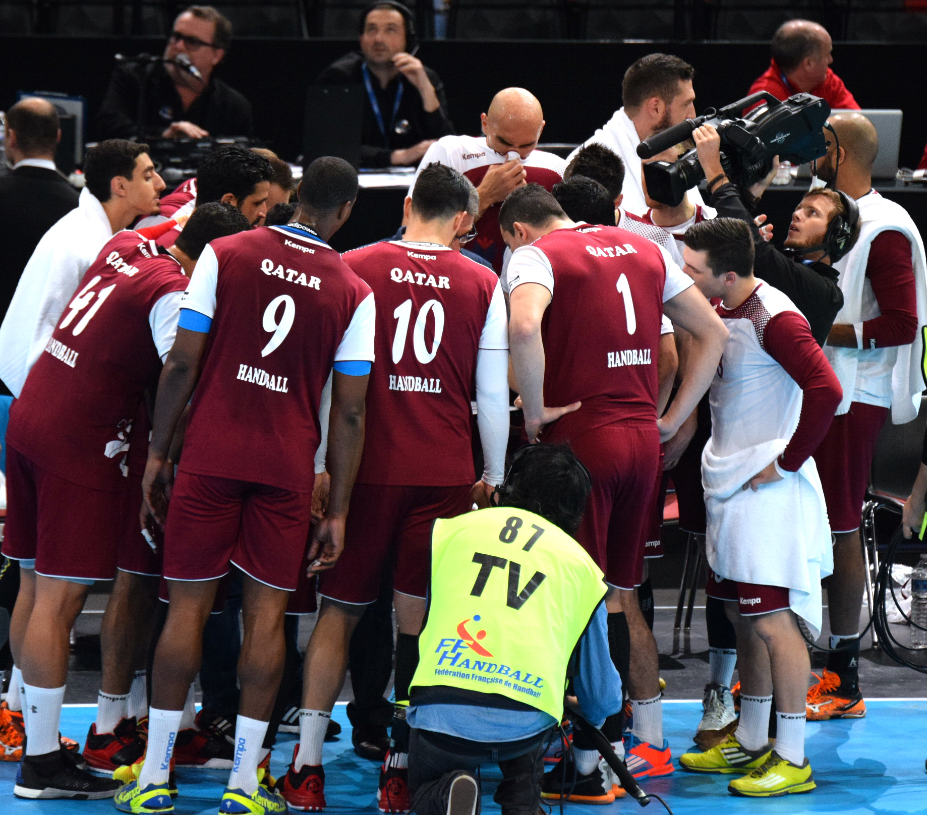 Le 10 janvier 2016 lors du match Norvège / Qatar durant la Golden League à l'AccordHotel Arena (Paris). Qatar